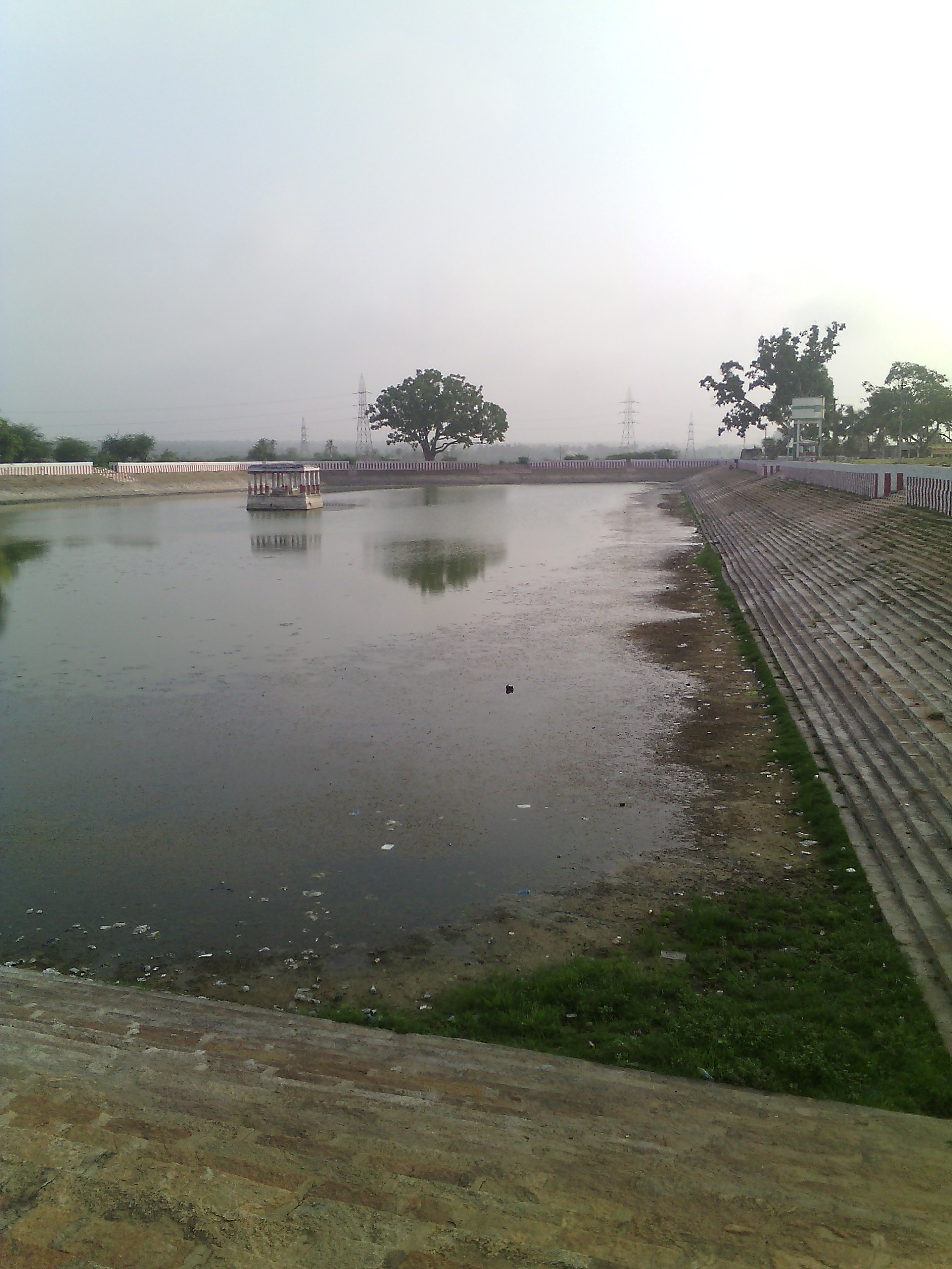 திருவாலங்காடு வடாரண்யேஸ்வரர் கோயில் தெப்பக்குளம்